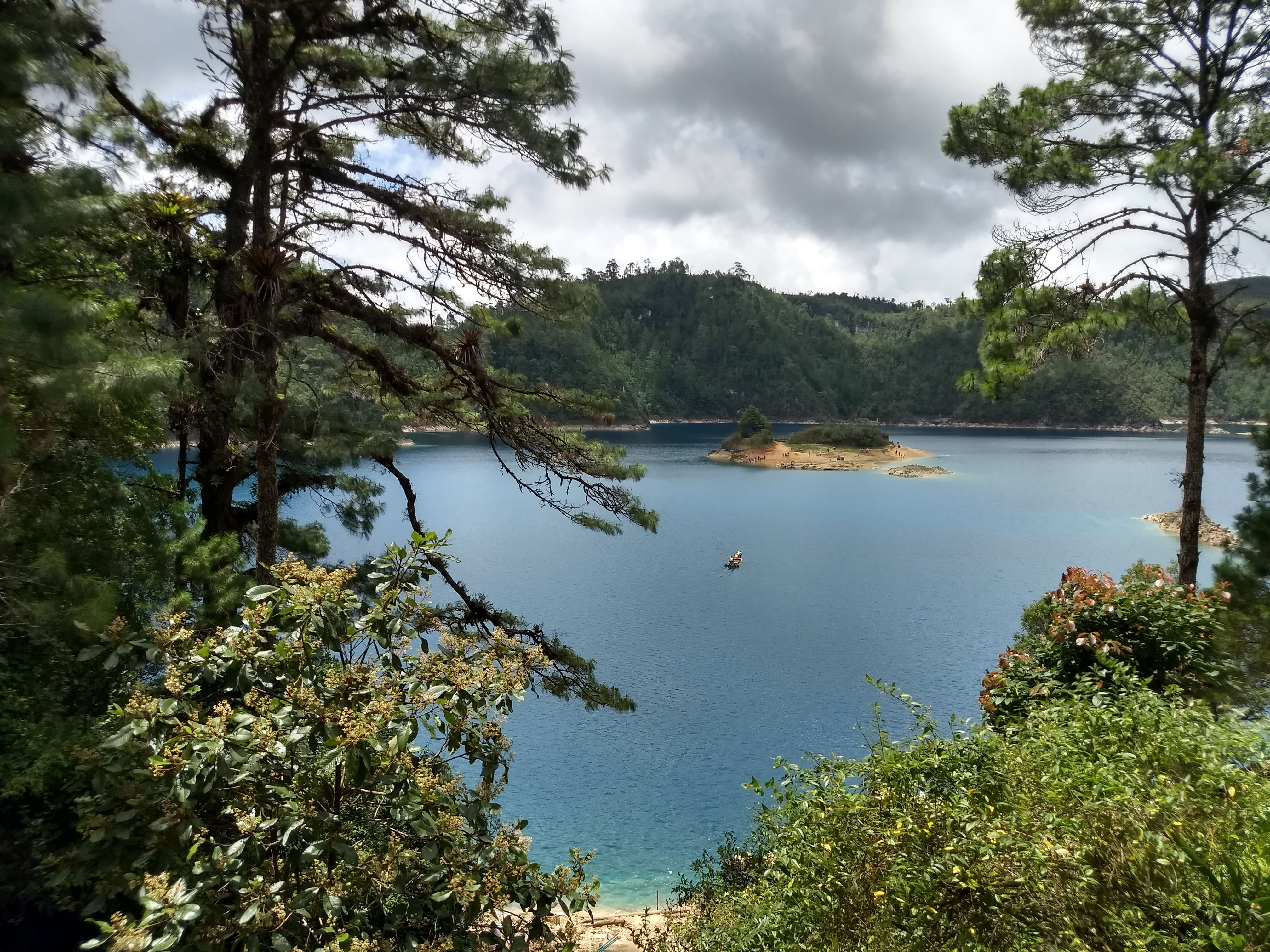 Uno de los lagos que se encuntran dentro del Parque nacional Lagunas de Montebello